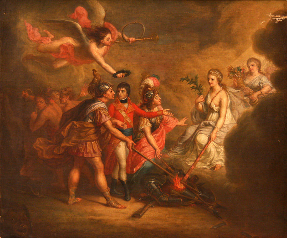 Dominique Doncre Allégorie de la paix d'Amiens 1802 Musée des beaux-arts d’Arras, Inv. 846.1